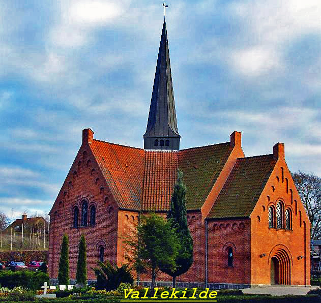 fra nordvest